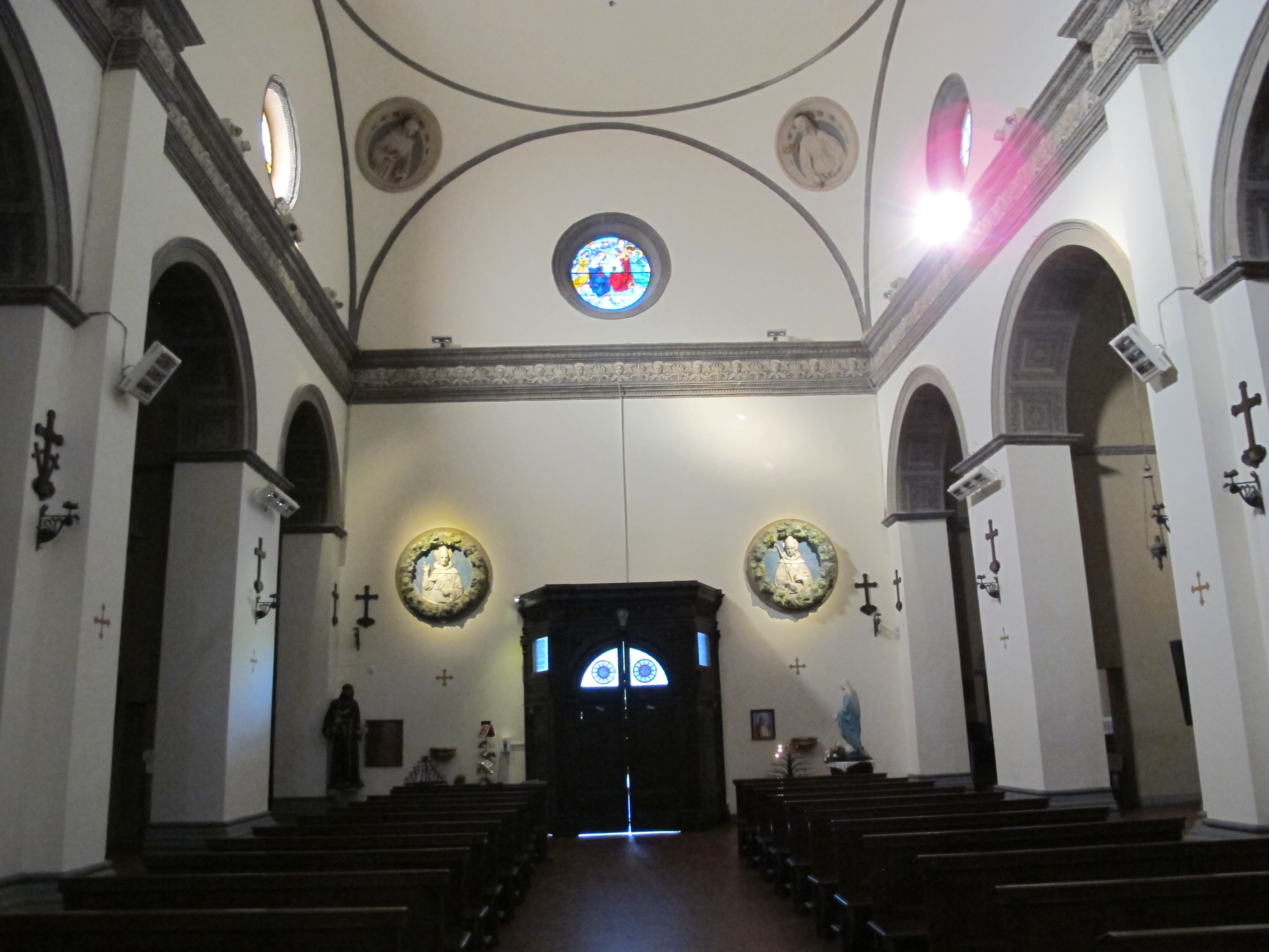 Basilica dell'osservanza, interno